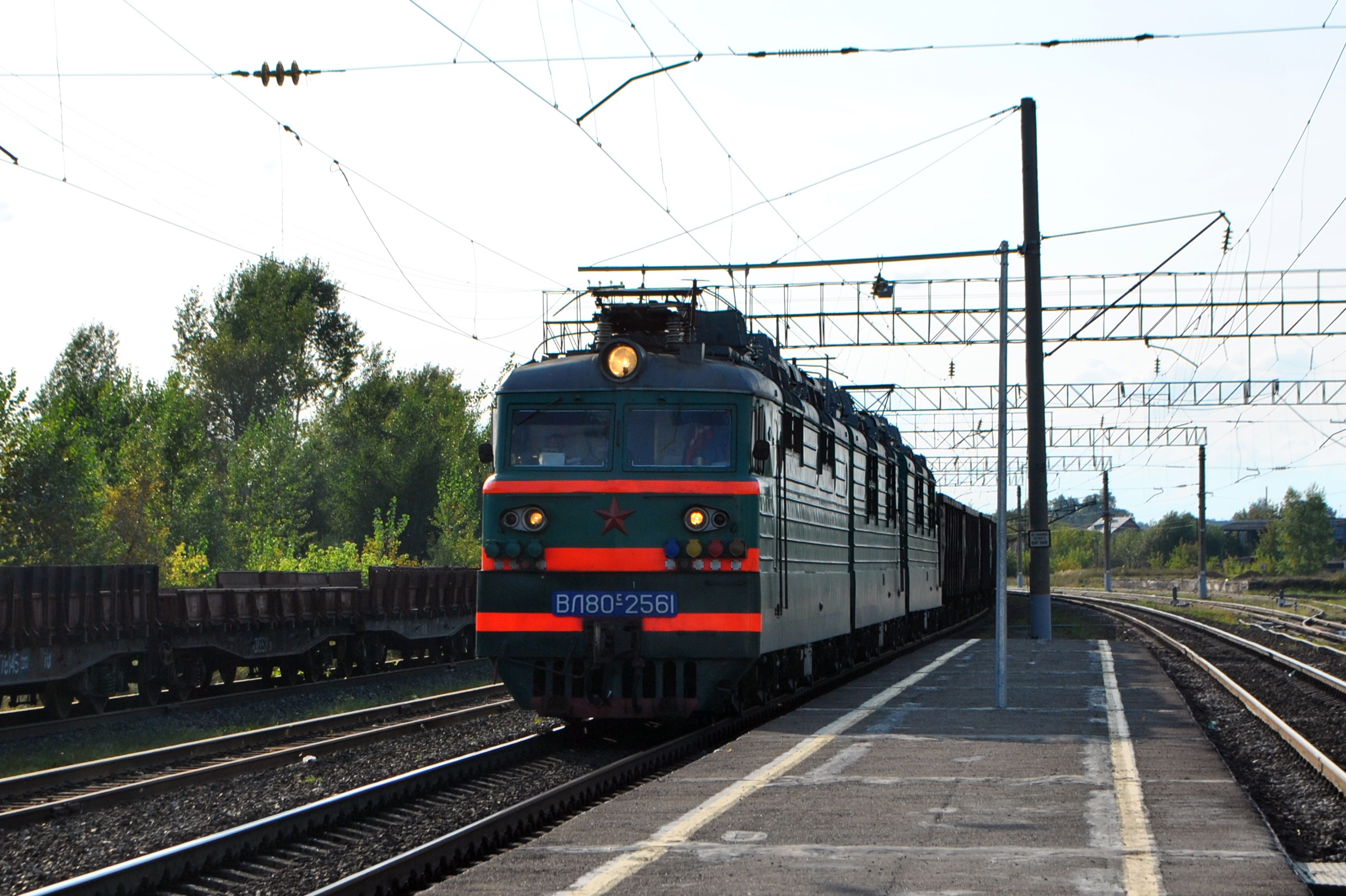 ВЛ80 на станции Камбарка